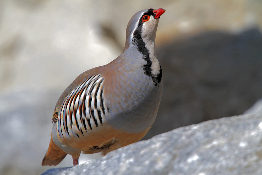 Steinhuhn in natürlichem Lebensraum